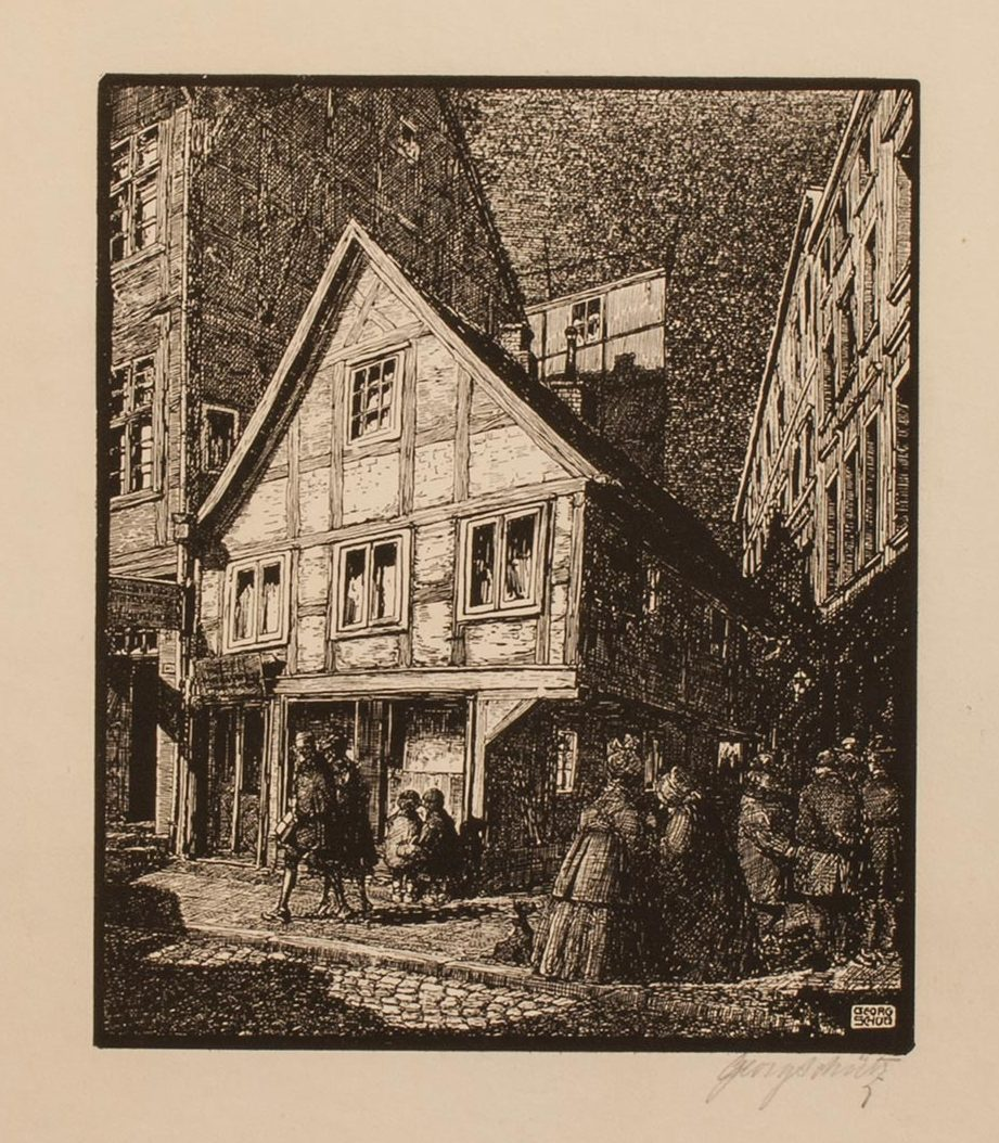 Eventuell aus den 1930er, vielleicht aus den 1940er Jahren stammt dieser Hochschnitt in den Maßen 22 x 19 cm, ungerade auf bräunlichem Papier. In der Platte findet sich rechts unten die Künstlersignatur, darunter mit Bleistift handsigniert der Name des Künstlers Georg Schütz (1874-1945), dessen Schweriner Adresse durch den Auktionator auch mit Buschstraße 15 angegeben wurde ...